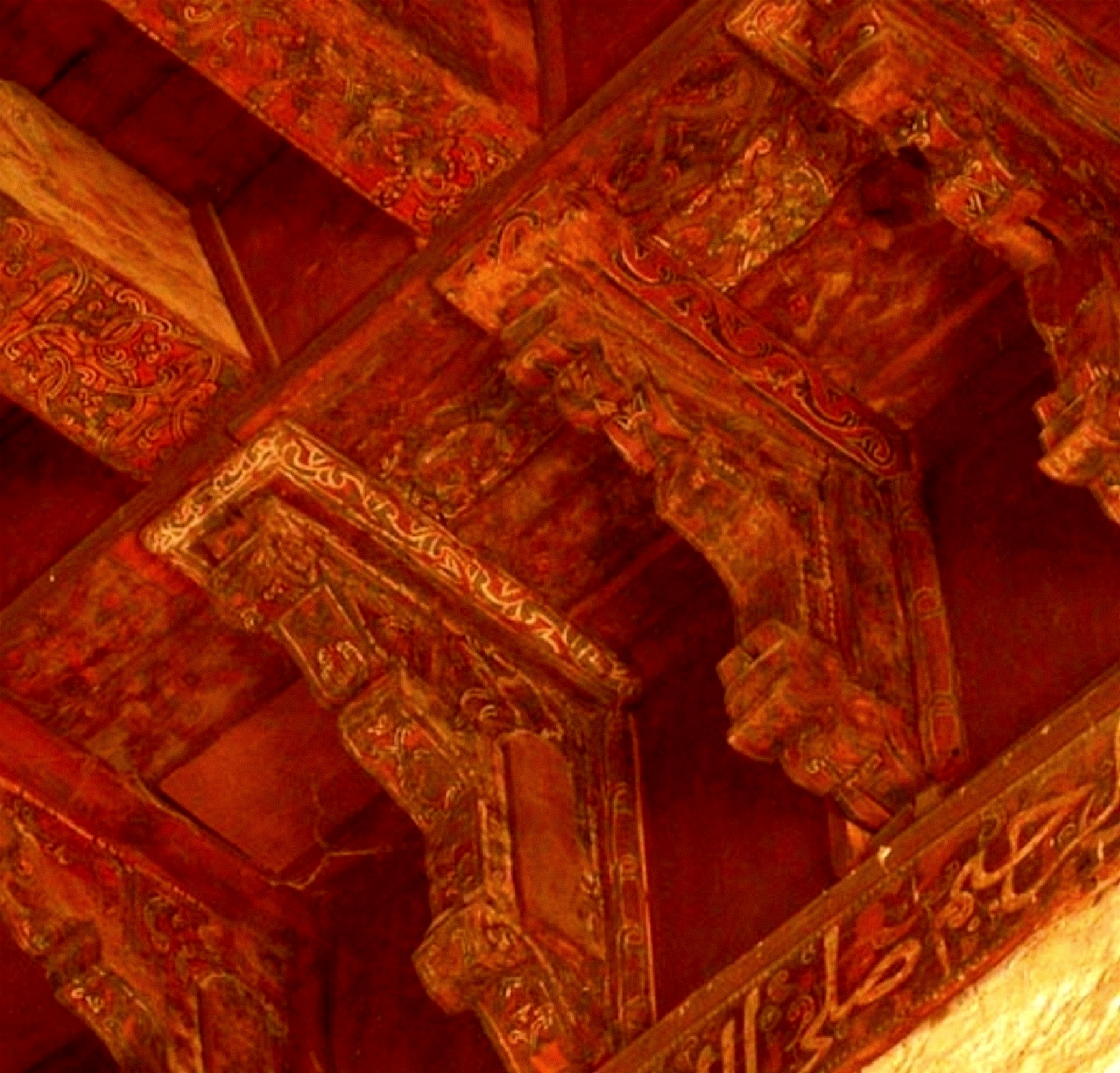 Gros plan sur des consoles en bois, peintes et sculptées, des plafonds de la salle de prière de la Grande Mosquée de Kairouan, en Tunisie.